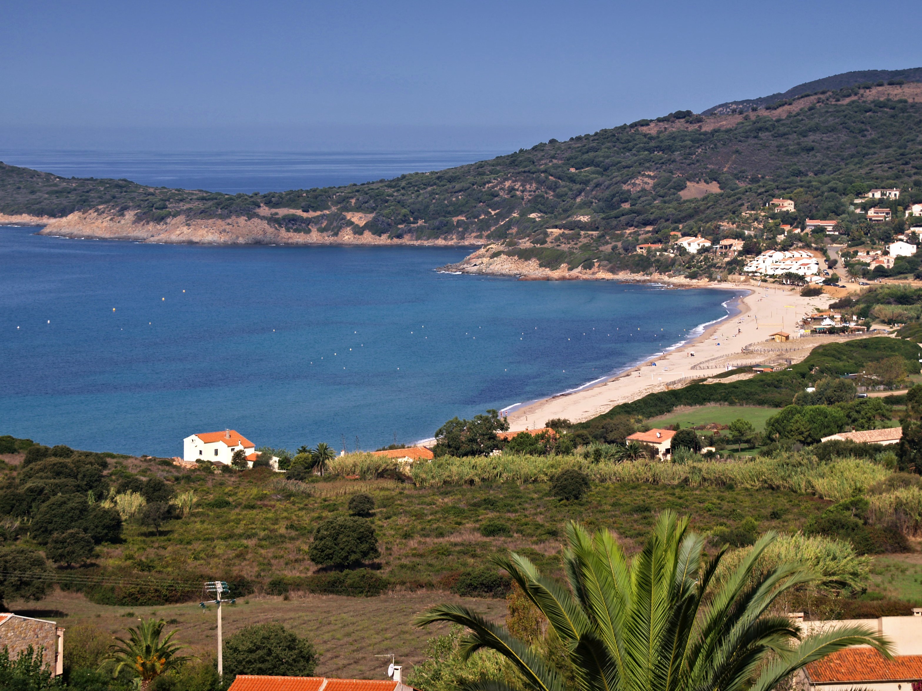 Cargère (Corse) - Plage de Peru, au nord du village